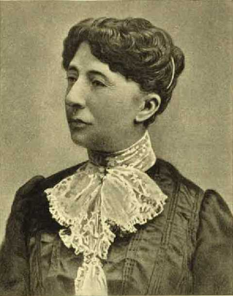 Fotographie (Original-Illustration) von Eleonore Feuerbach auf Seite 148 in A. Kohut "Ludwig Feuerbach", dem Autor (A. Kohut) zur Verfügung gestellt durch Elenonre Feuerbach (Beleg, siehe S. IX).